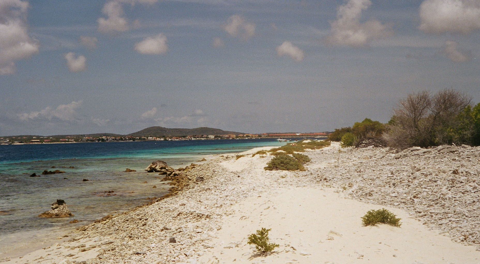 Kleinbonaire